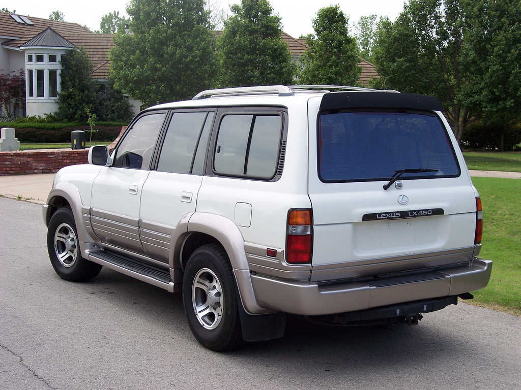 LX450